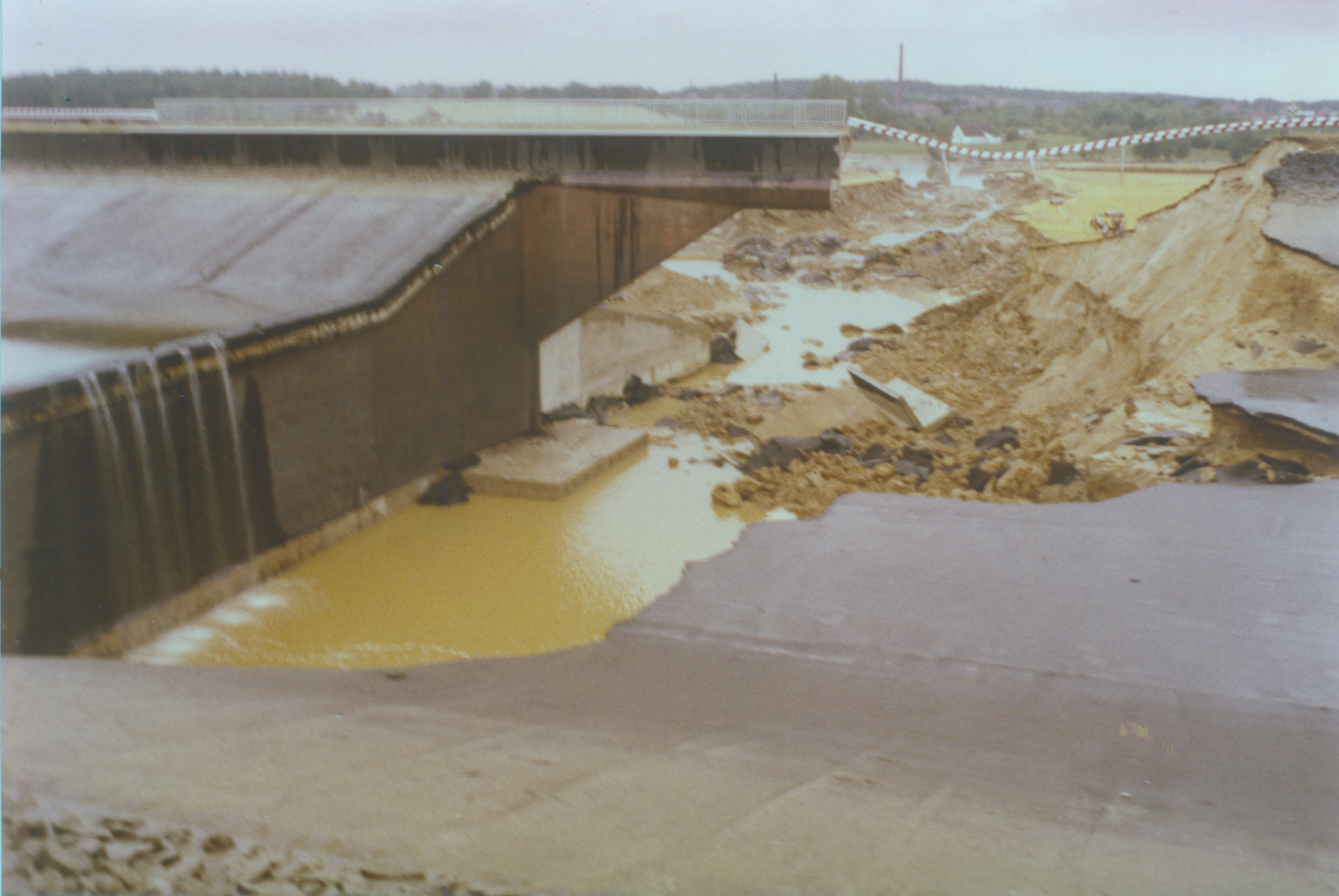 Bruch des Elbeseitenkanals in Adendorf, Ortsteil Erbstorf, bei Lüneburg Juli 1976